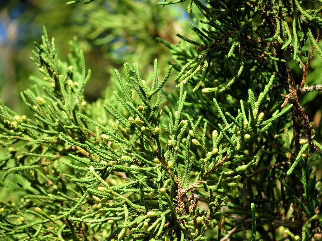 Bermuda Cedar (Juniperus bermudiana) with male cones